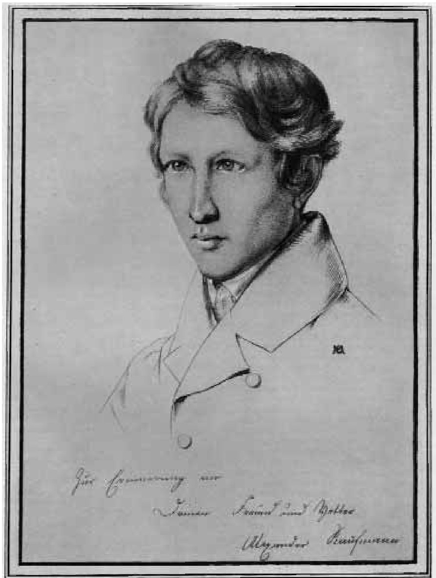 Alexander Kaufmann in jungen Jahren, undatiert.